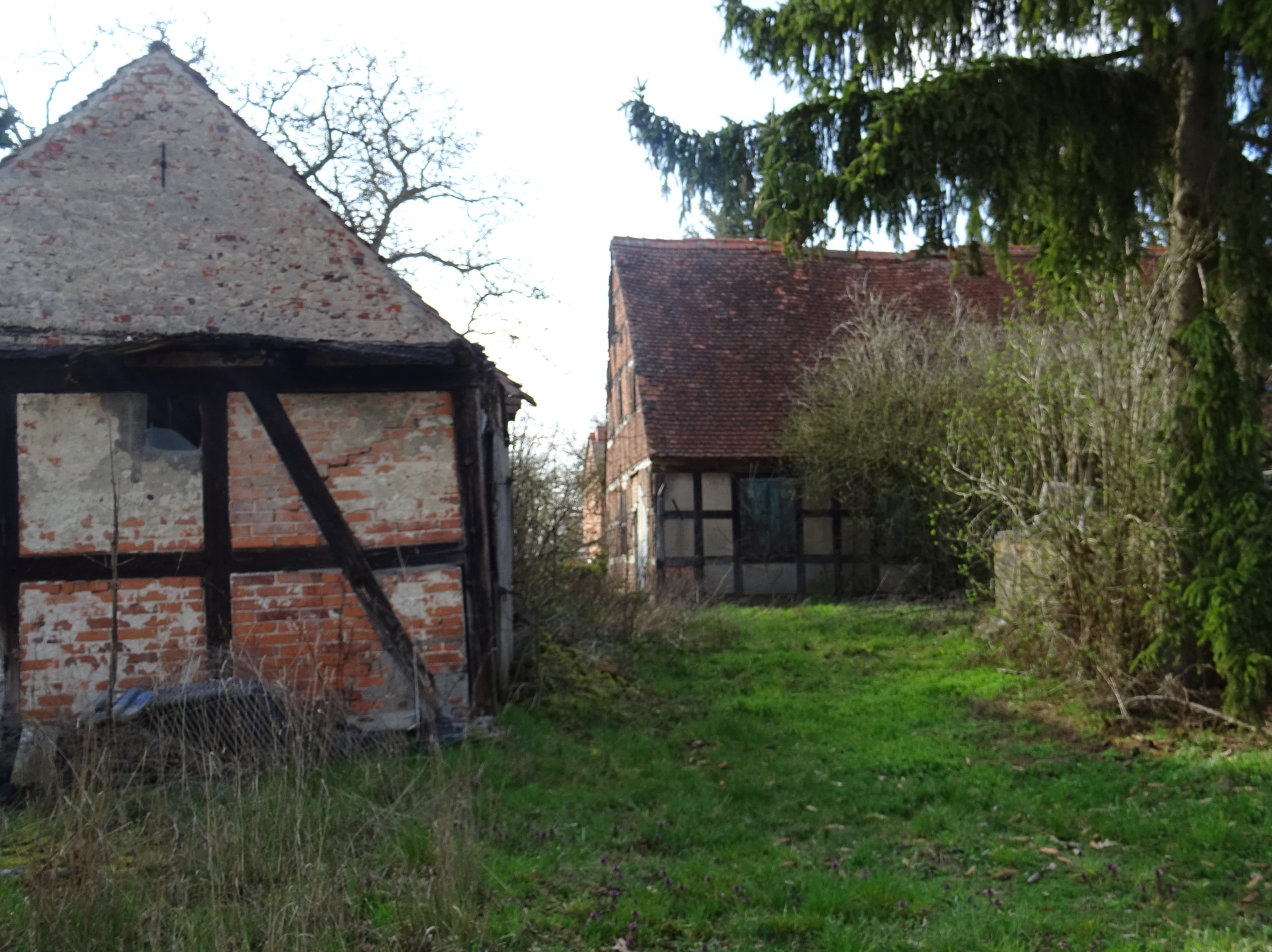 Dobbrun, Ortsteil von Osterburg, denkmalgeschützter Bauernhof Dorfstraße 5